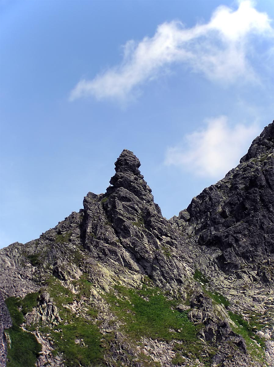 Białowodzka Turniczka rozdzielająca dwa siodła Białczańskiej Przełęczy Wyżniej